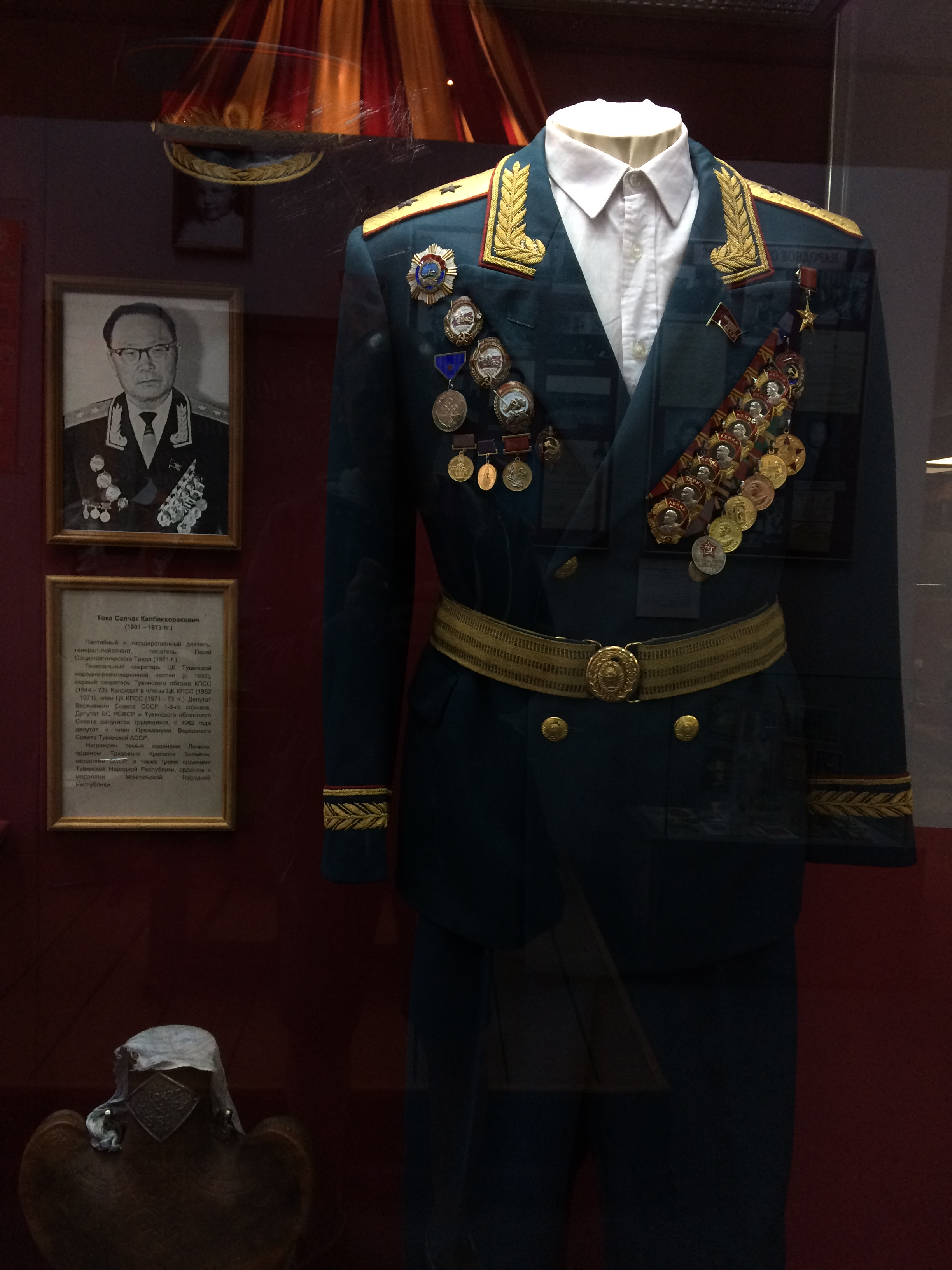 Парадная форма Тока С. Х. со всеми наградами. Из экспозиции Национального музея Республики Тыва "Алдан-Маадыр"